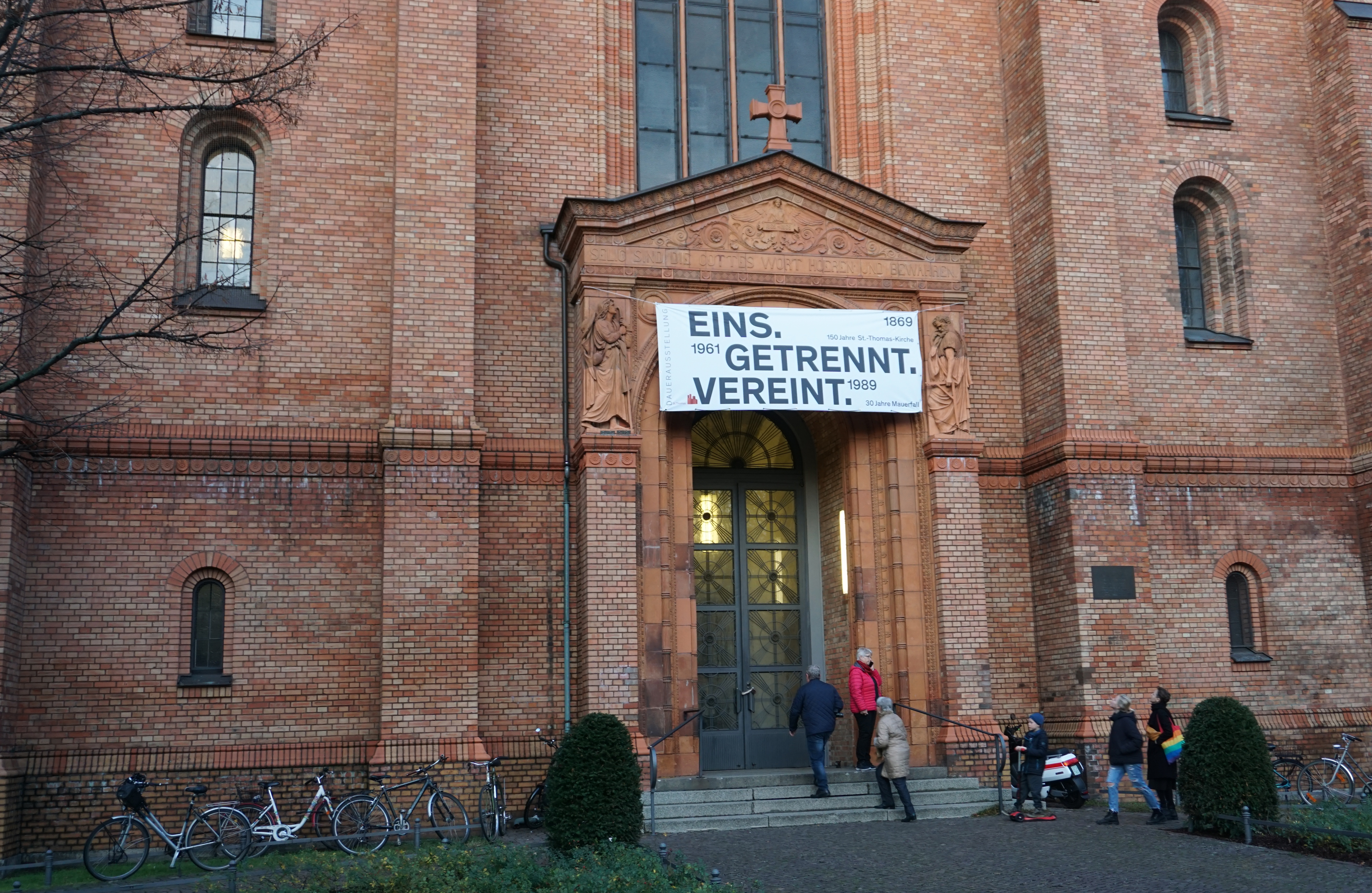 Portal der St. Thomas-Kirche in Berlin-Kreuzberg mit Einladung zu Jubiläumsveranstaltungen 150 Jahre